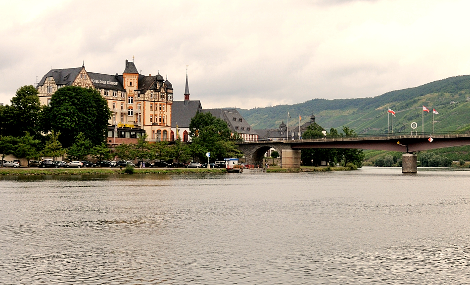 Das Bild zeigt das 'Hotel 3 Könige' am Moselufer in Bernkastel-Kues. Aufgenommen wurde es von der Bernkasteler Uferseite. Im Hintergrund ist der Turm des Sankt-Nikolaus Hospitals zu sehen.